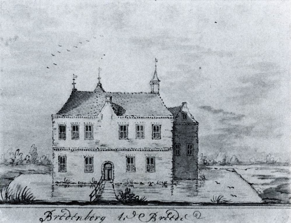 Tekening (kopie) van de Breedenborg van Jacobus Stellingwerff (1667-1727)